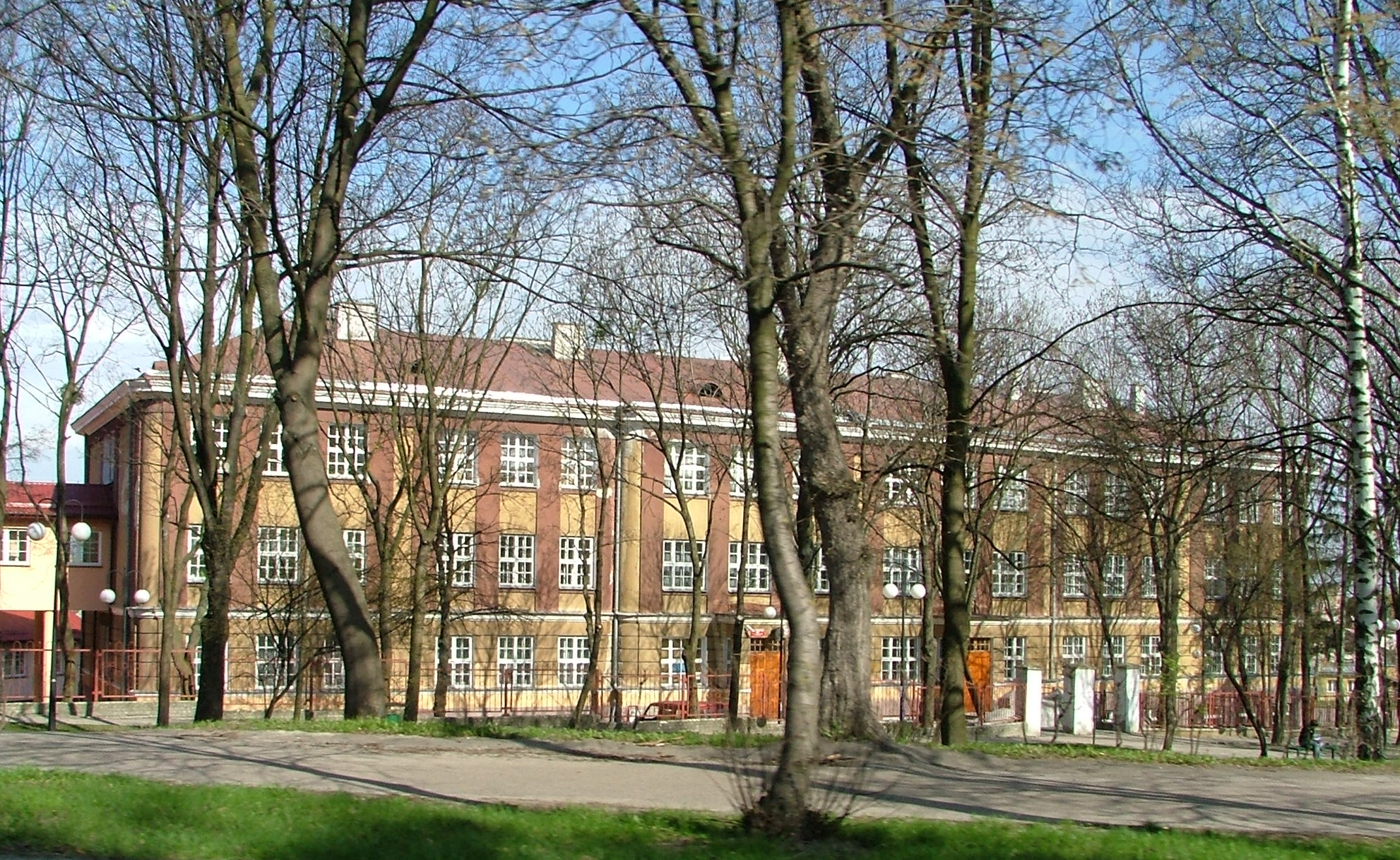 Chełm (województwo lubelskie), Szkoła Podstawowa nr 5 im. Marii Konopnickiej